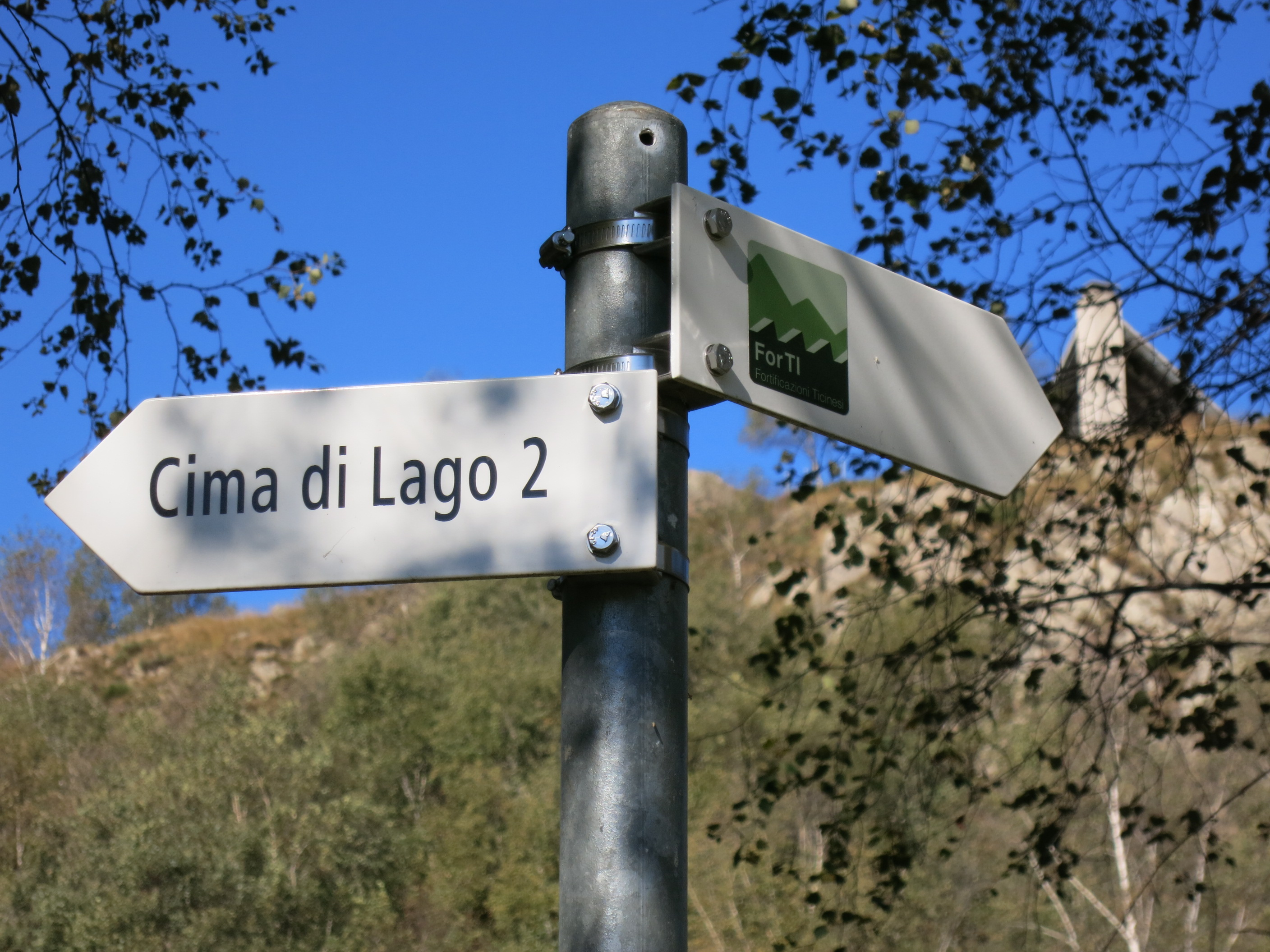 Sperrstelle Gola di Lago Ti, Schweiz